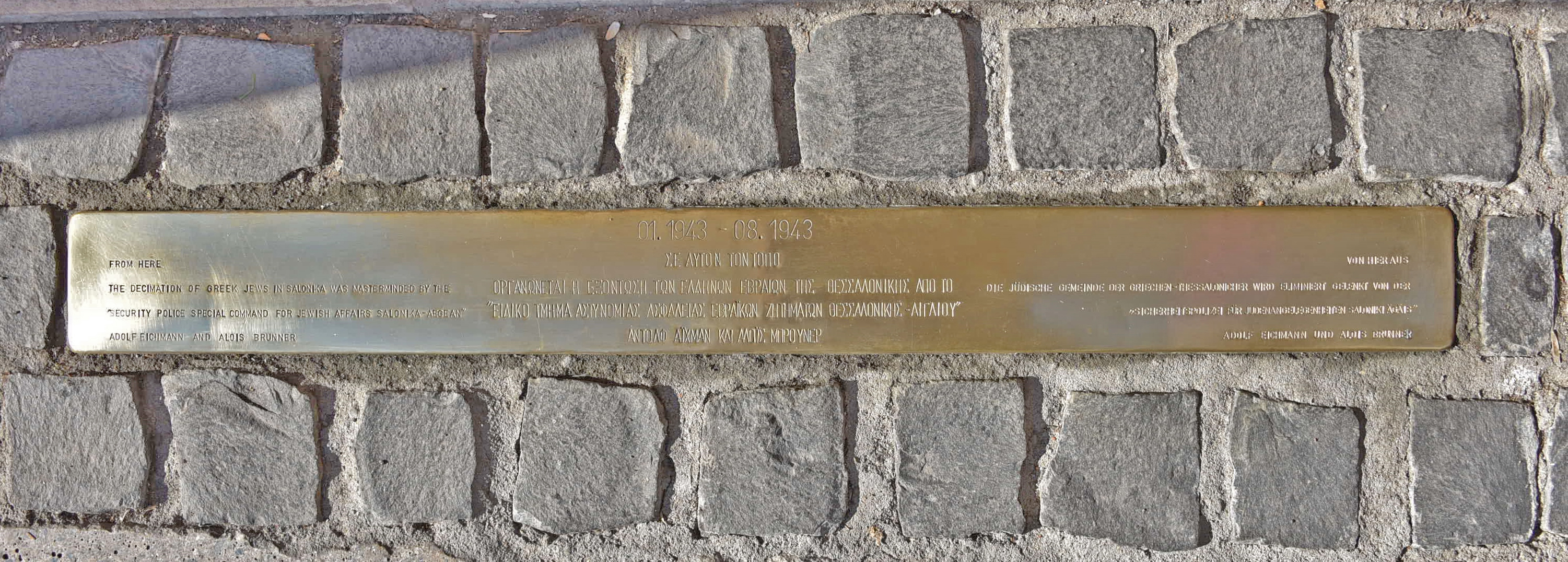 Stolperschwelle in Thessaloniki